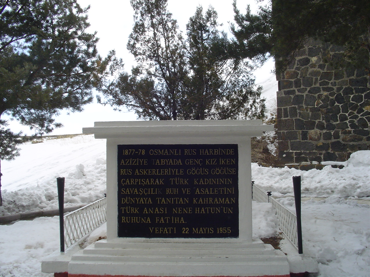 Erzurum Aziziye Tabyası'nda 30 Mart 2007 günü Yasemin Alptekin tarafından çekilmiştir.